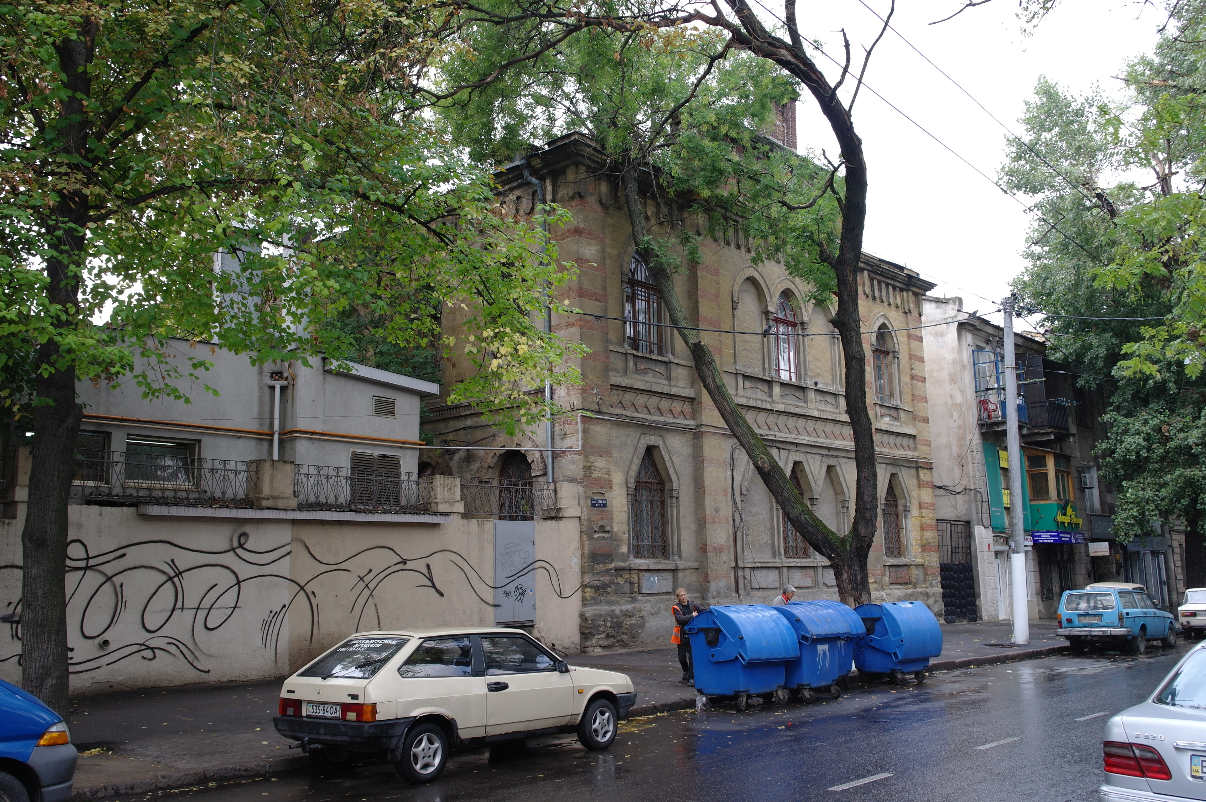 Одеса, Мала Арнаутська, 46 синагога